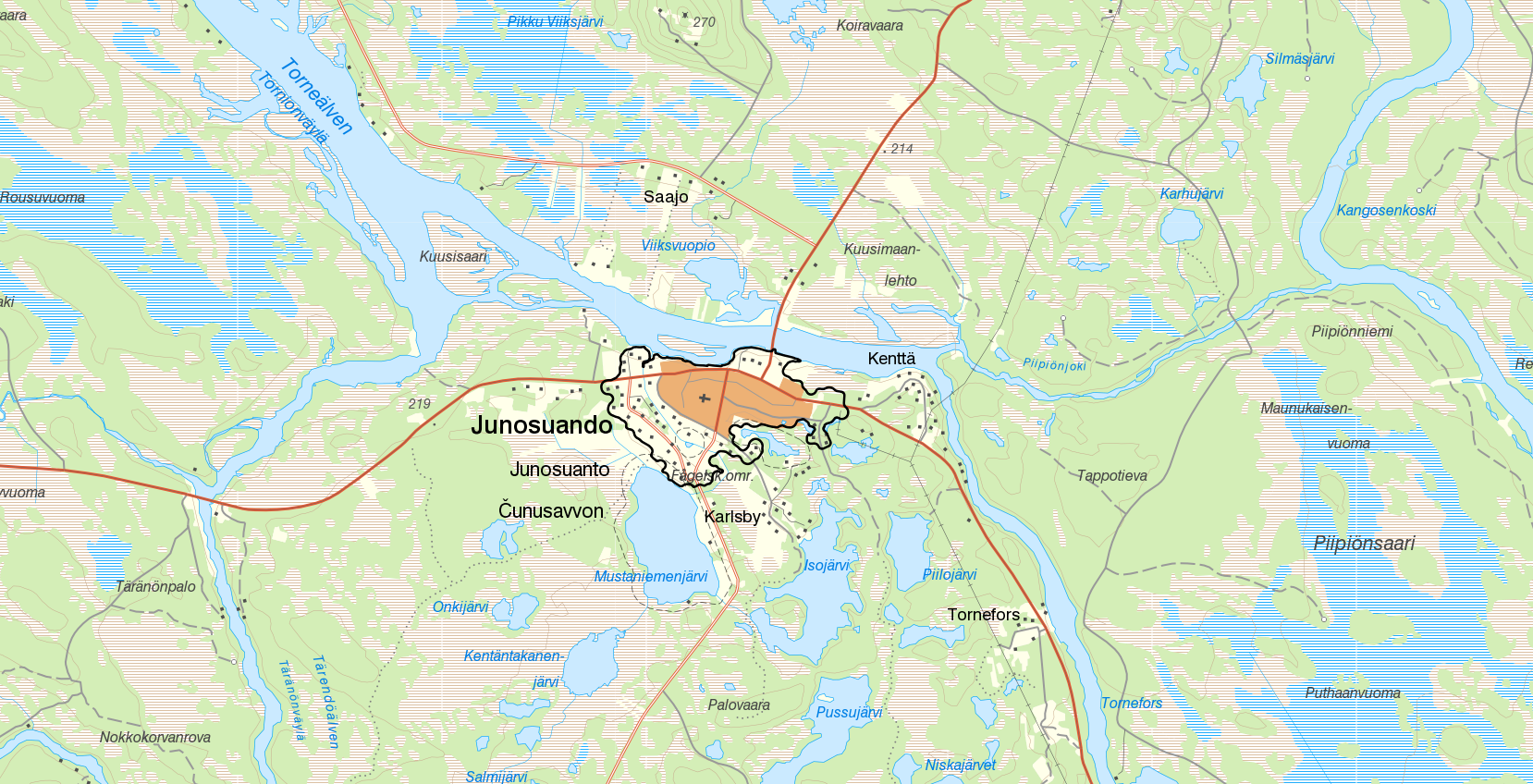 Tätorten Junosuando med gränserna från Statistiska centralbyråns tätortsavgränsning 2015. Bakgrundskarta från Lantmäteriet, skala 1:30 236.